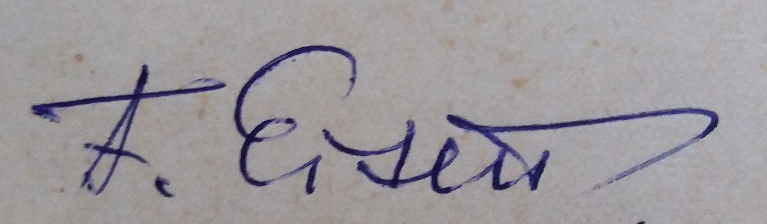 Ferdinand Eiseni allkiri